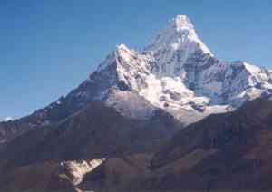 Ama Dablam - 6,812 metres (22,349 feet), Himalaya, Nepal